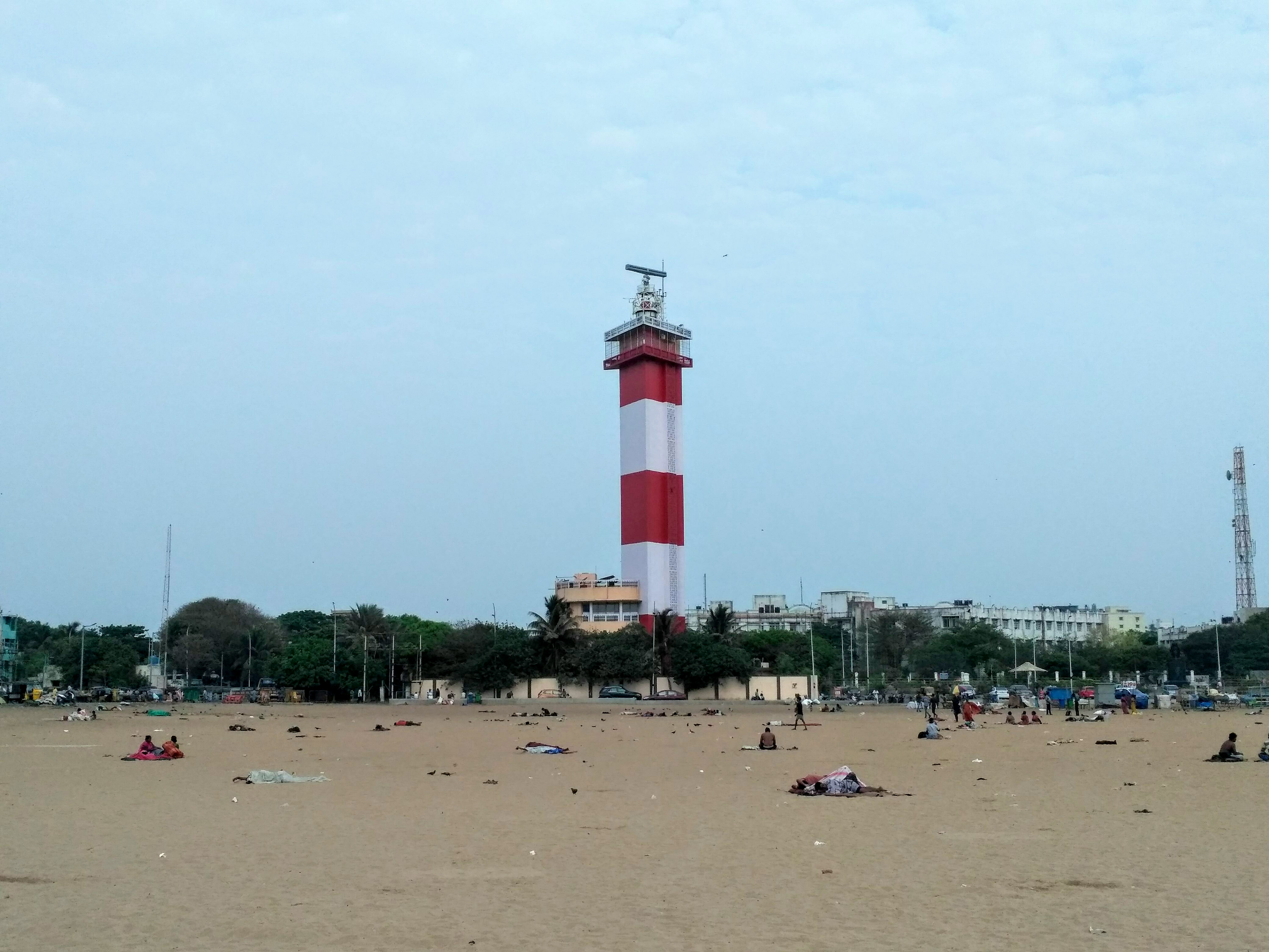 சென்னை மெரினா கடற்கரையிலிருந்து எடுக்கப்பட்ட, சென்னை கலங்கரை விளக்கம்.